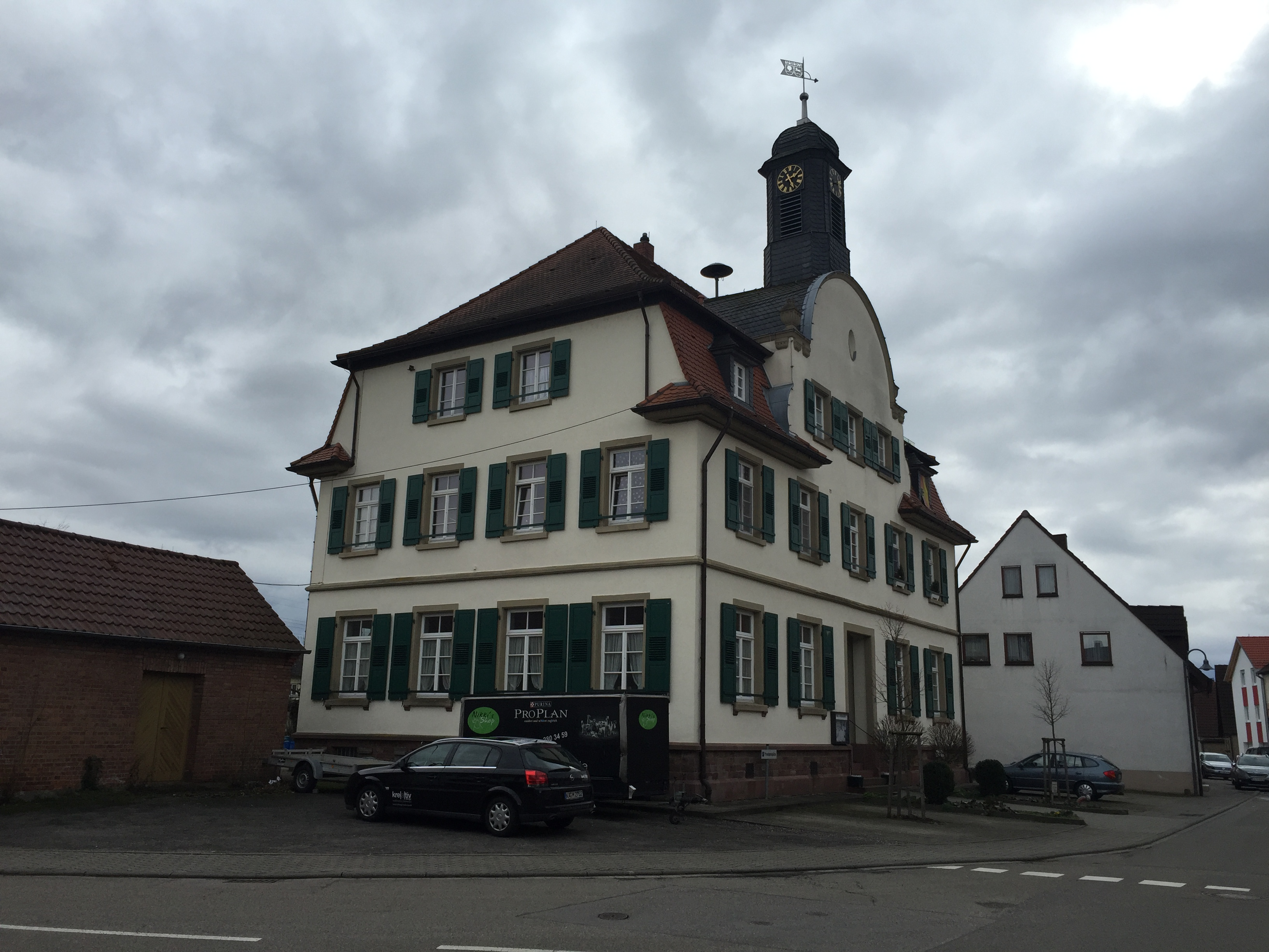 Altes Rathaus und ehemaliges Schulhaus von Blankenloch-Büchig